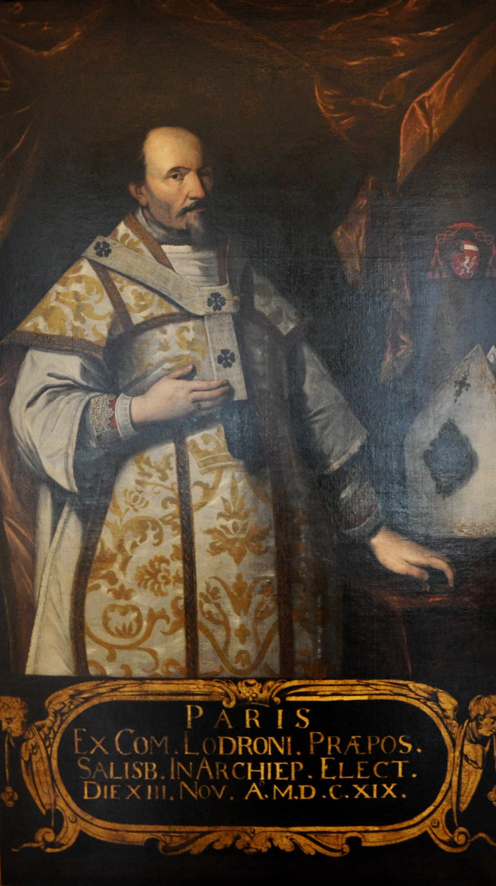 Erzbischof Paris Graf Lodron im Messgewand, anonym, Salzburg 1638, Öl auf Leinwand; Land Salzburg, Inv. Nr. 1111130441; ausgestellt im Salzburg Museum